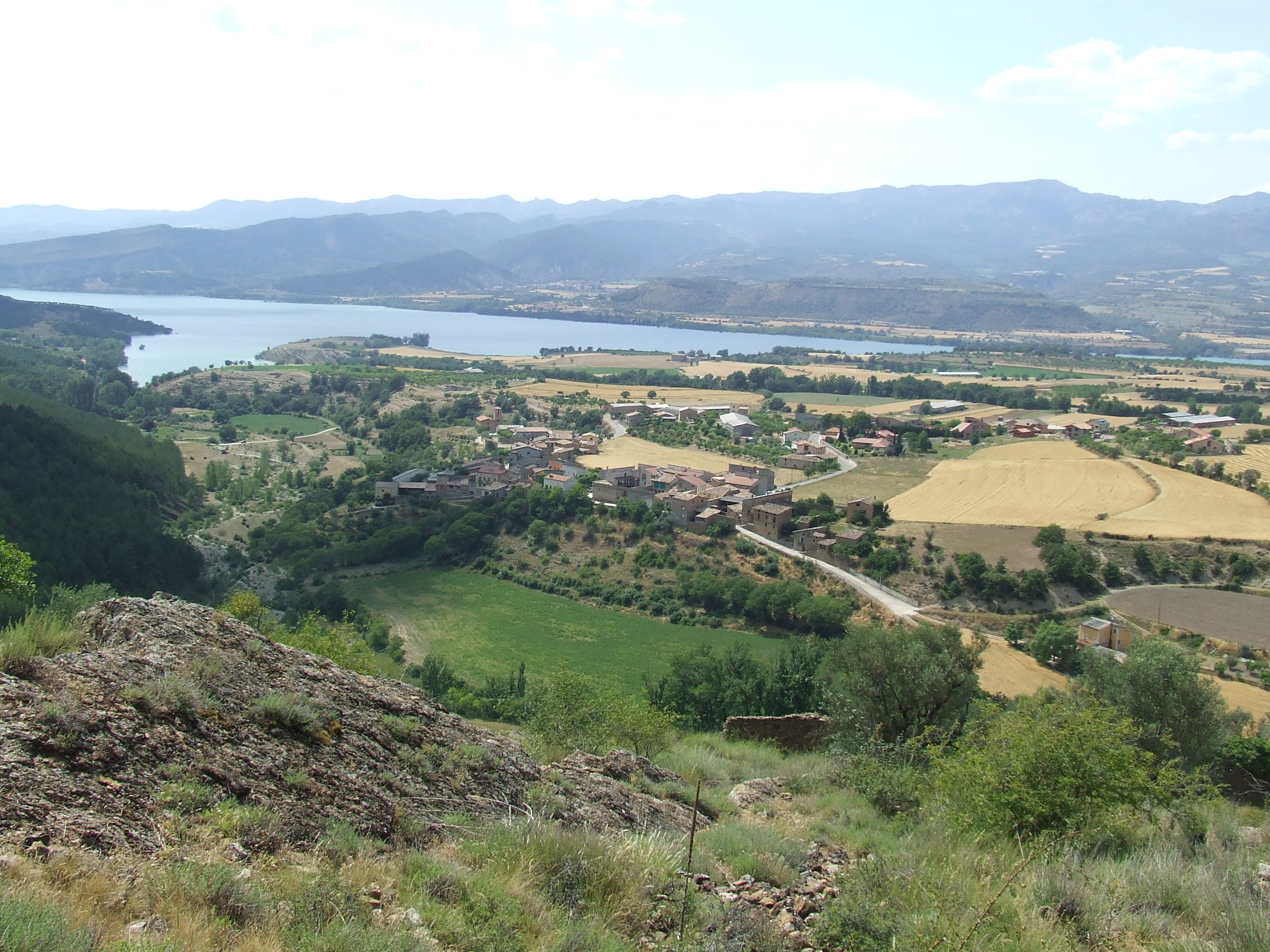 El terme d'Aramunt des d'Aramunt Vell (Conca de Dalt, Pallars Jussà)